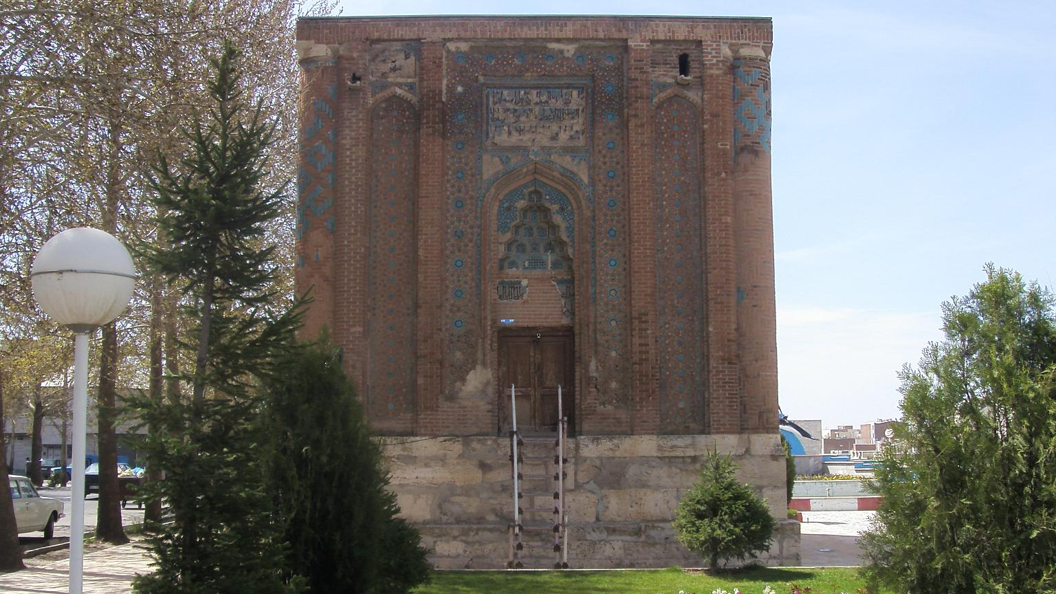 Ghaffariyeh dome, Maragheh, Iran